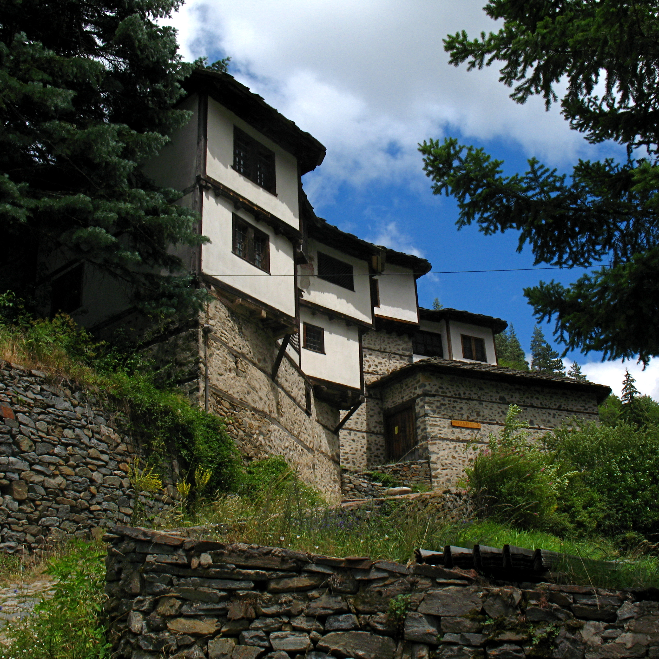 Етнографски музей в Широка лъка, България